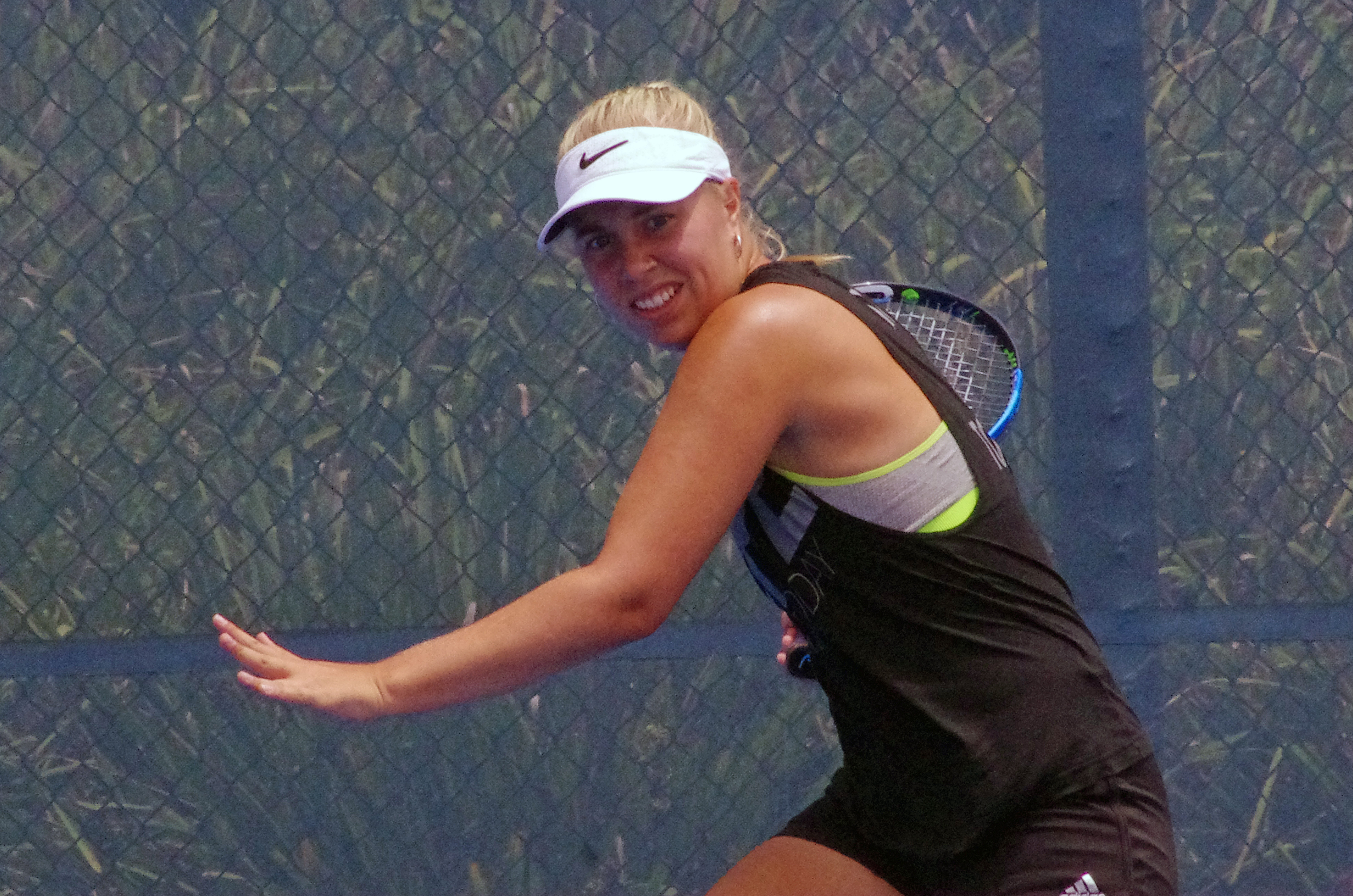 ABBIE MYERS